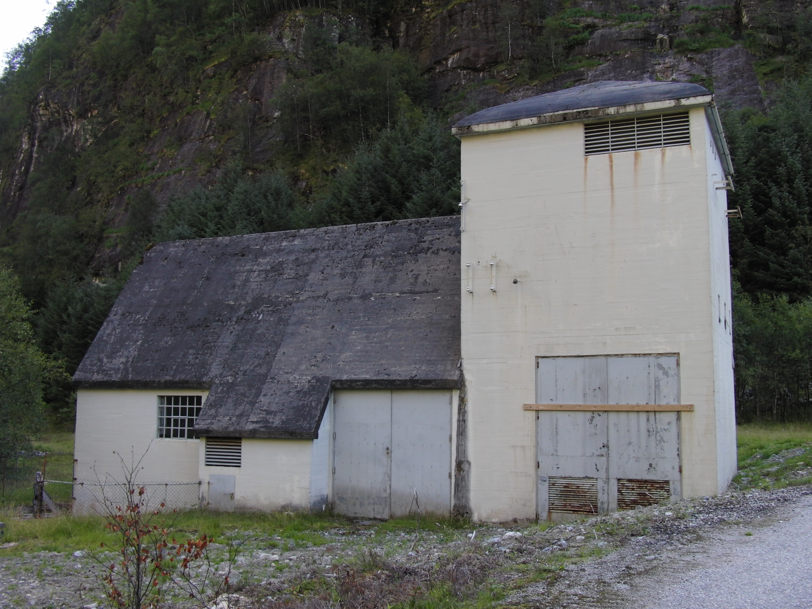 Hommelfoss gamle kraftverk